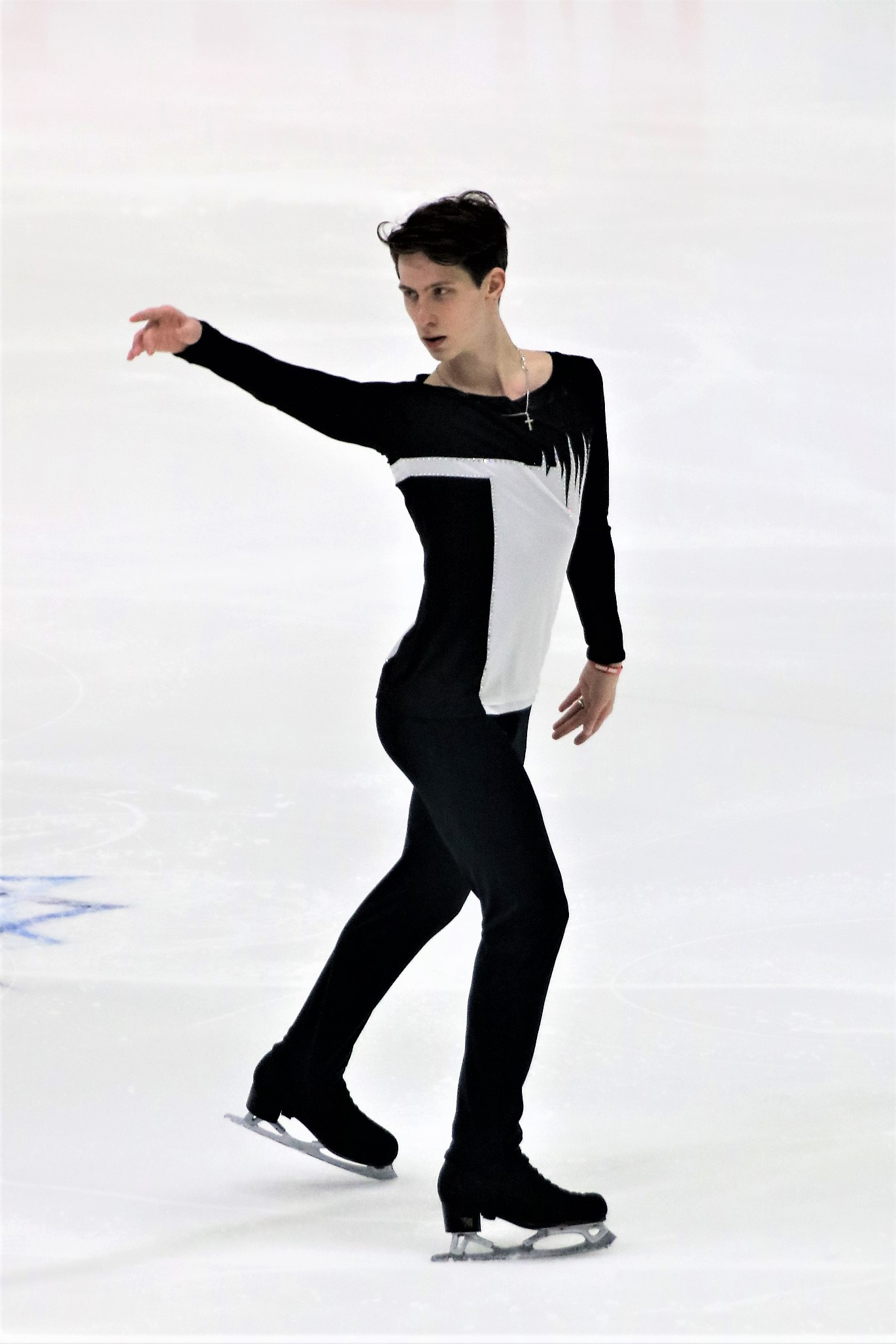 Андрей Лазукин (Россия) на Гран-при Хельсинки 2018.